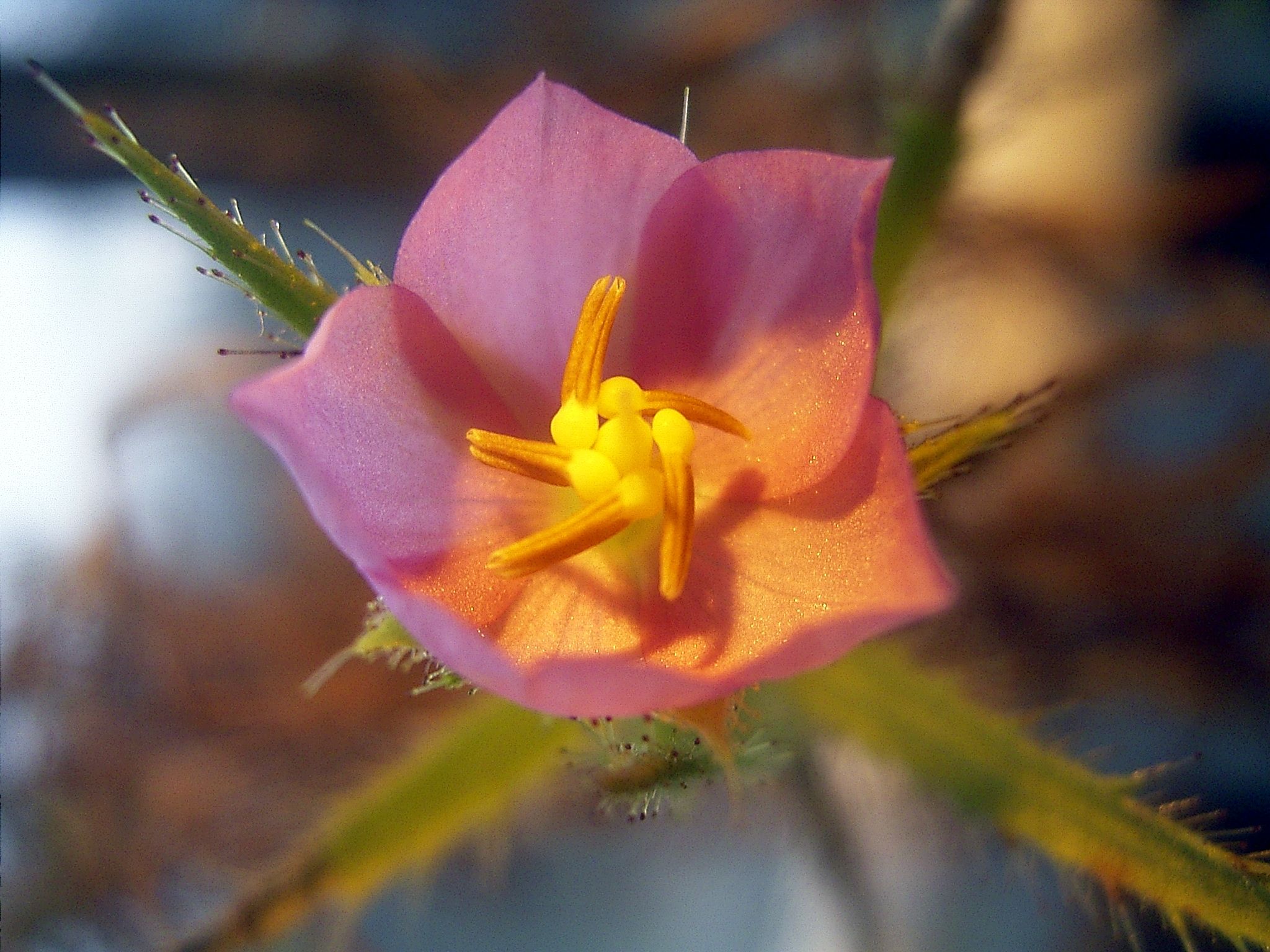 Flora Roridula dentata